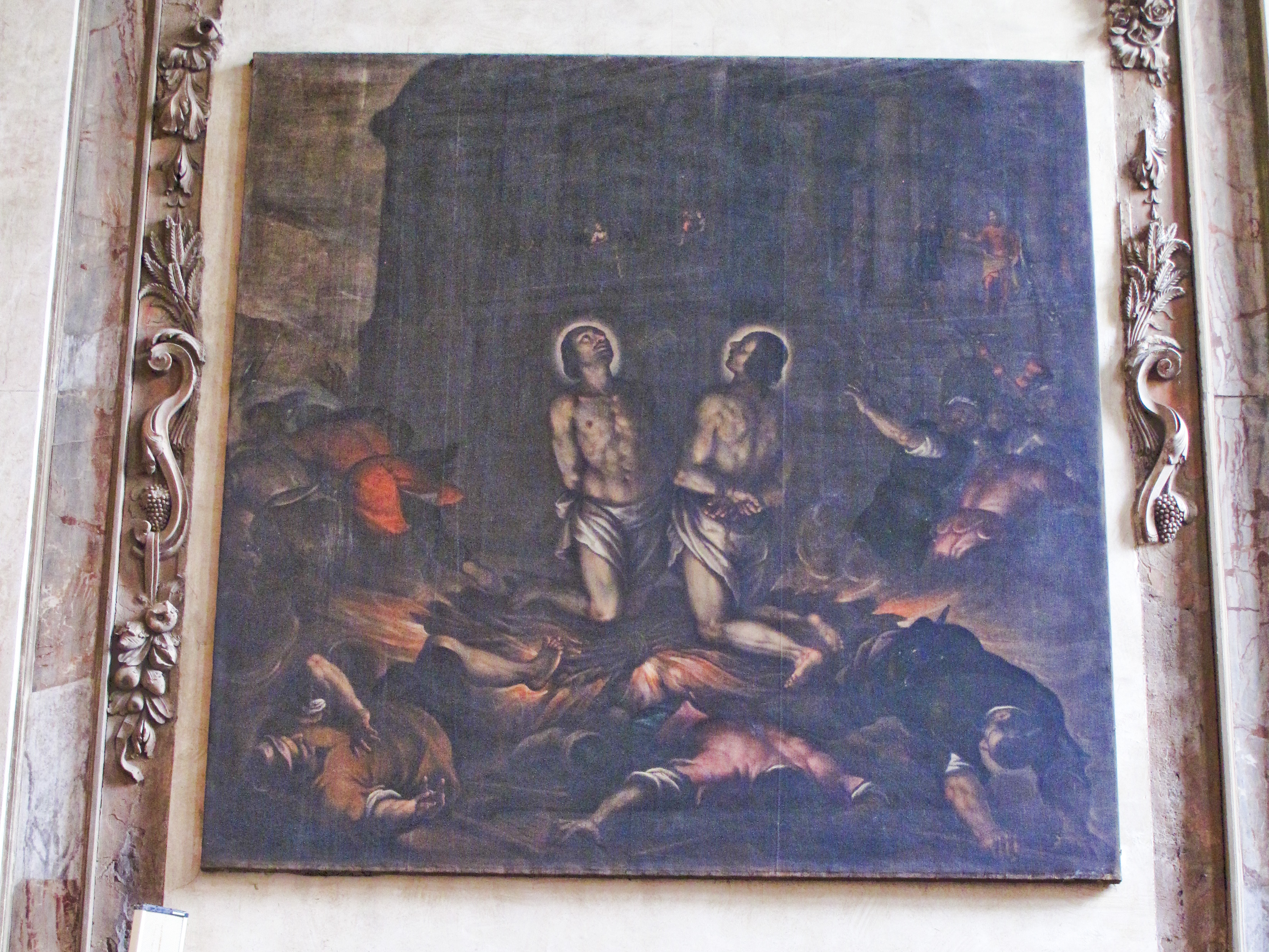 Vicenza - Oratorio del Gonfalone - I Santi Leonzio e Carpoforo, tela di Zelotti